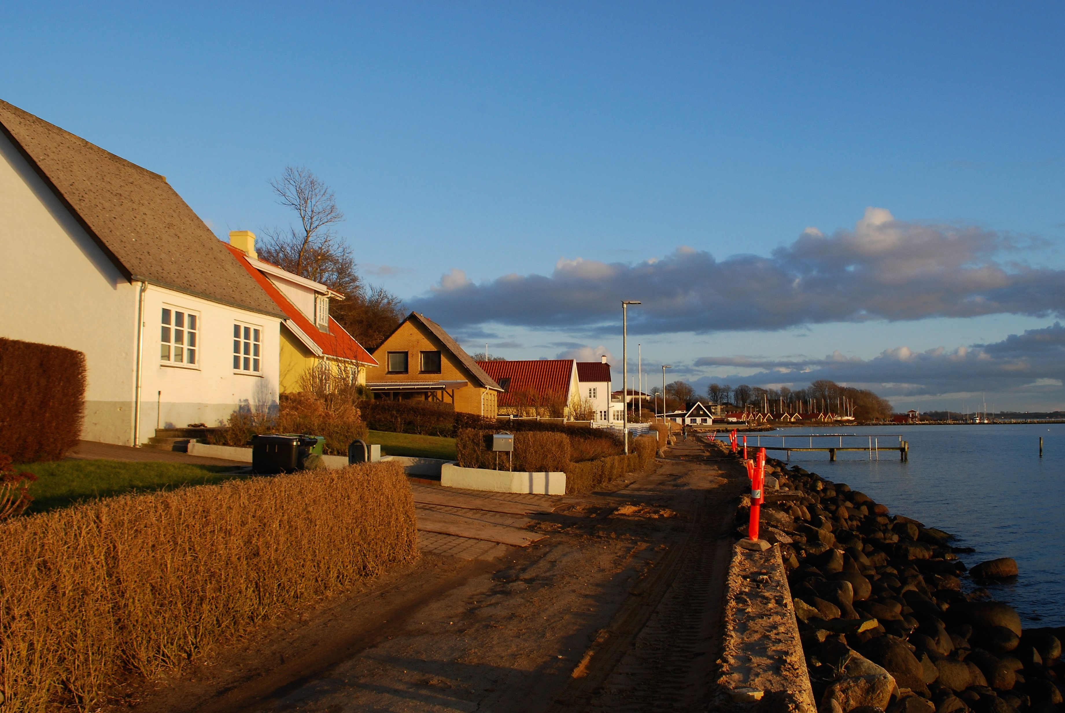 Egernsund, Denmark